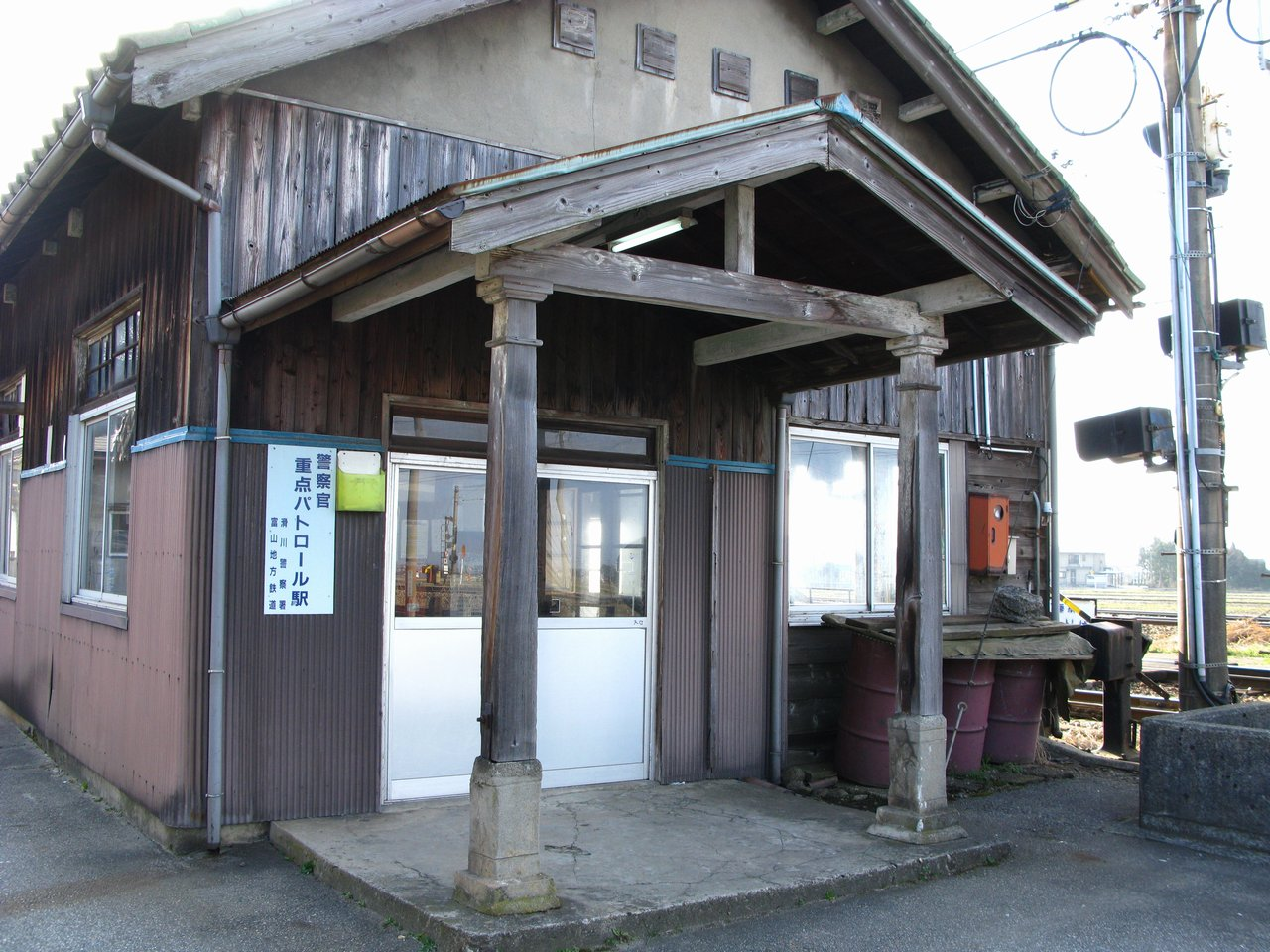 Hayatsukikazumi Station